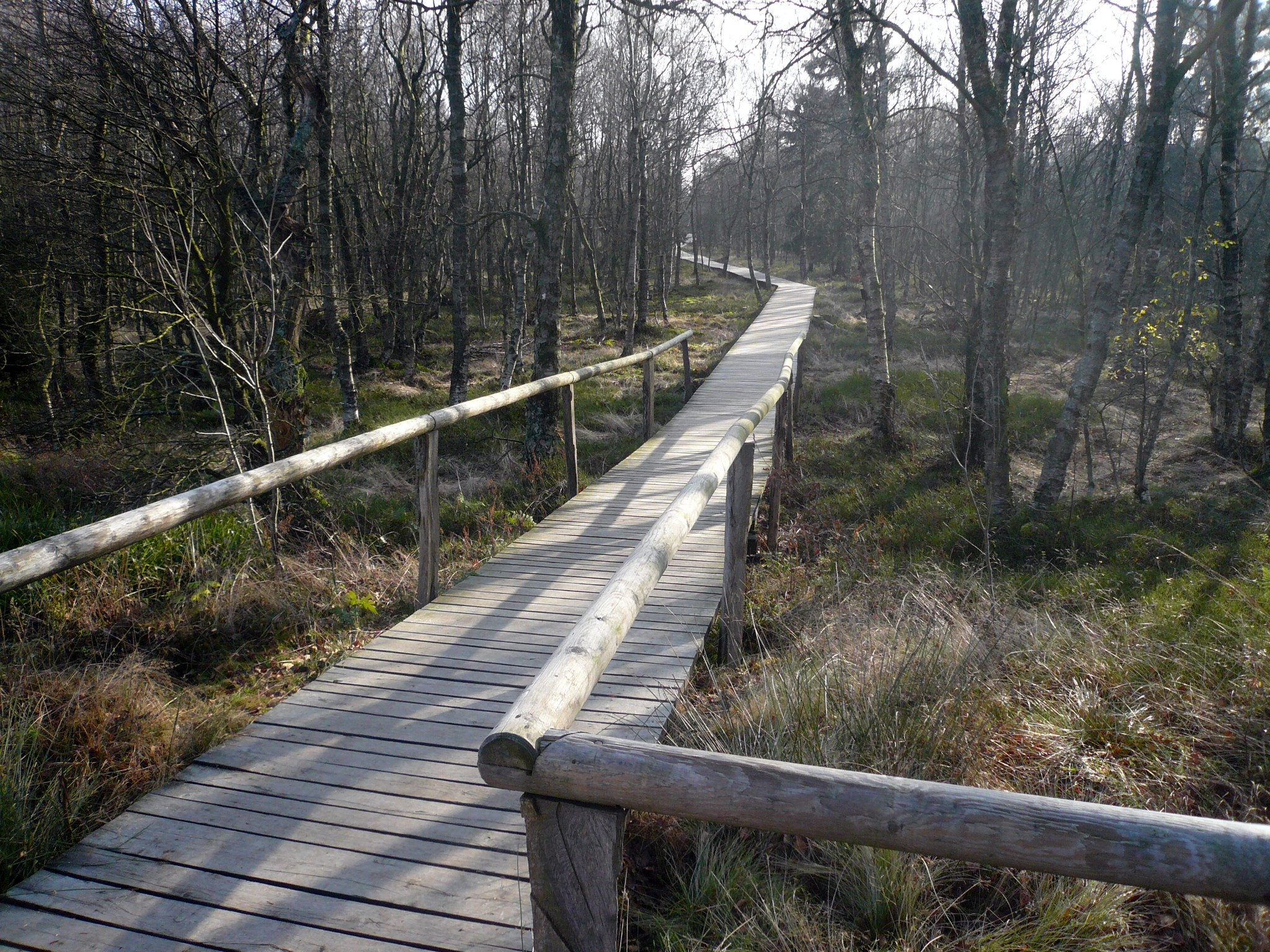 Rotes Moor, Bohlensteg am Turm